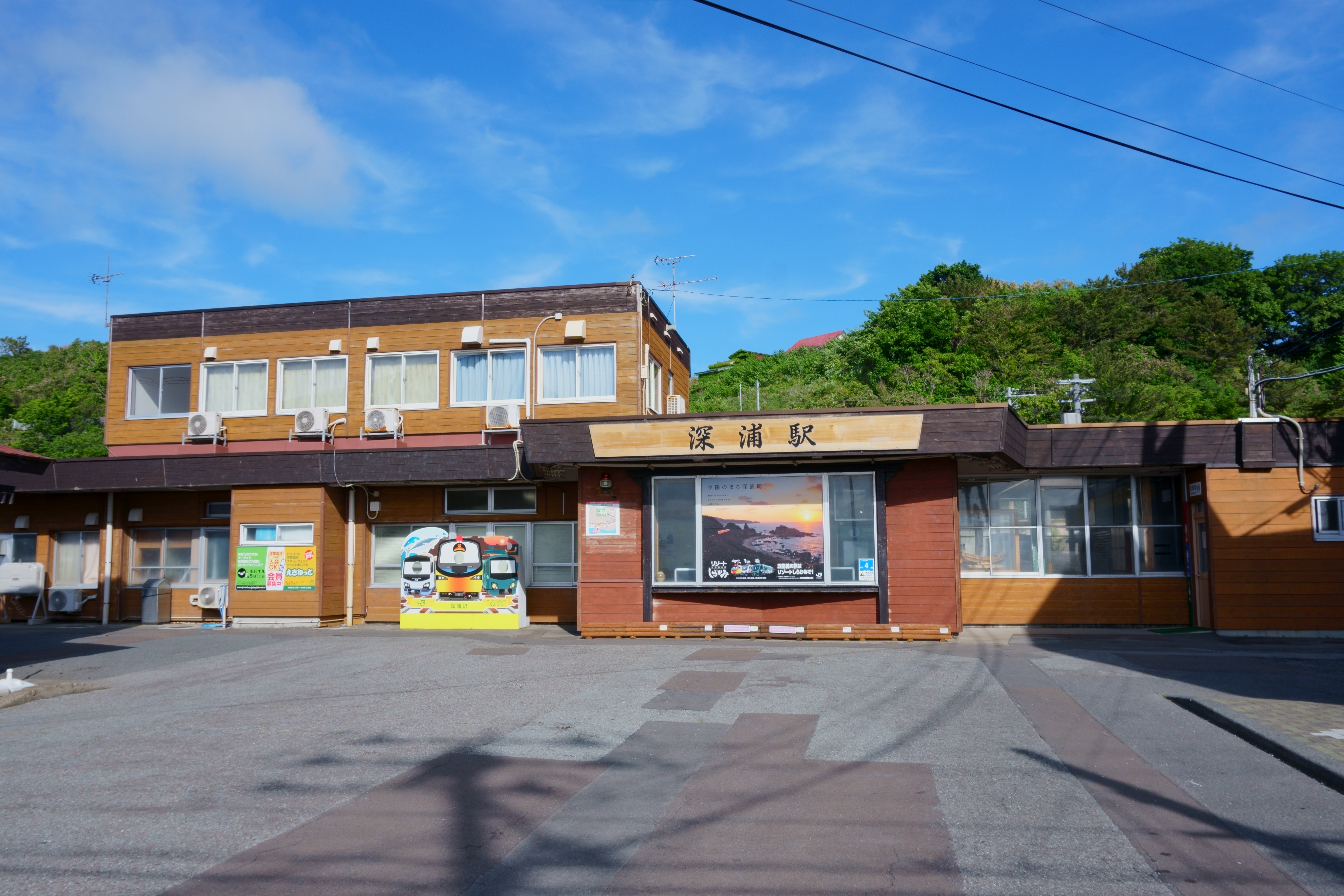 五能線 深浦駅（青森県西津軽郡深浦町）